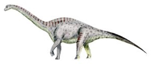 Tastavinsaurus, pencil drawing, digital coloring